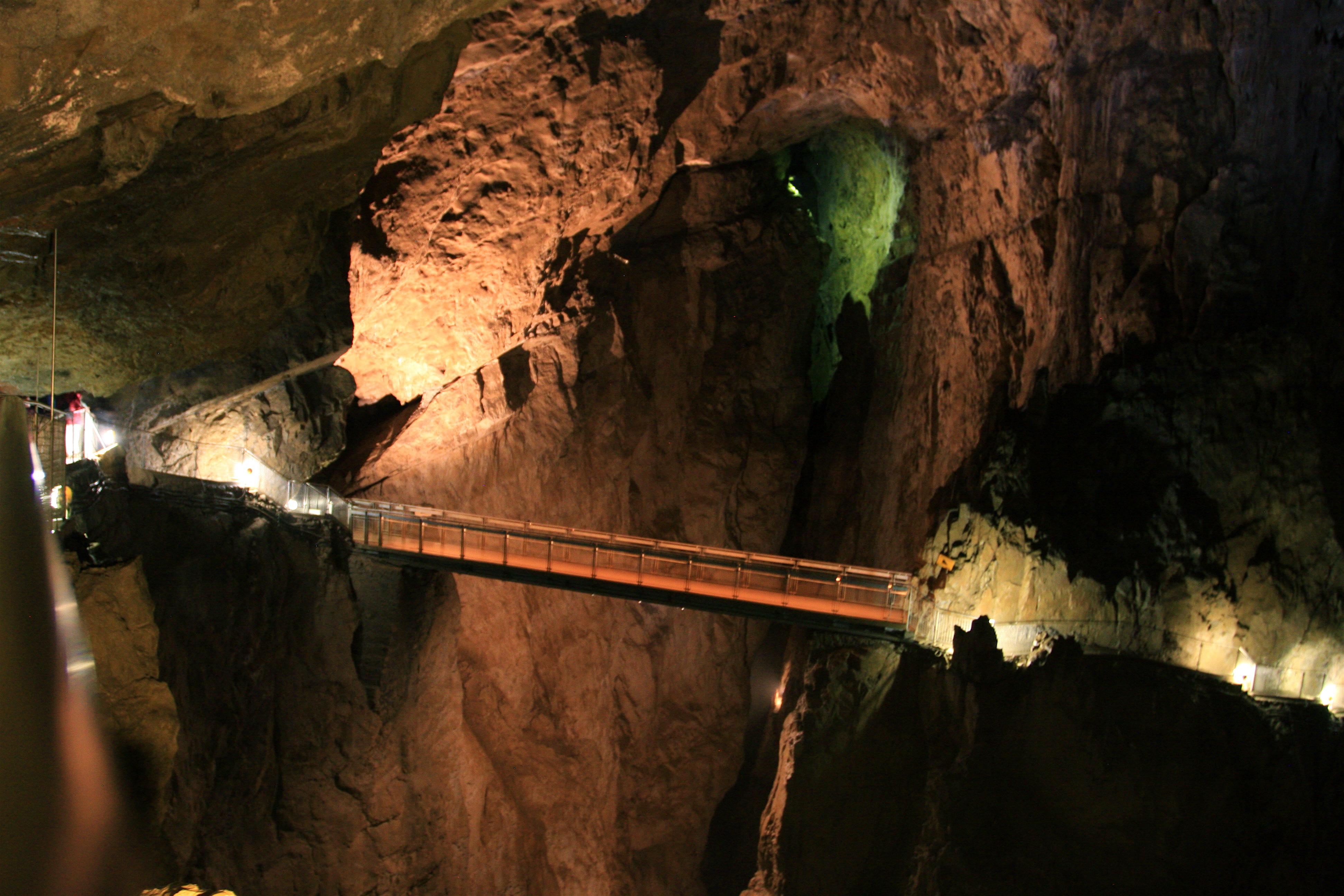 Bridge Inside Skocjan Caves - Slovenia